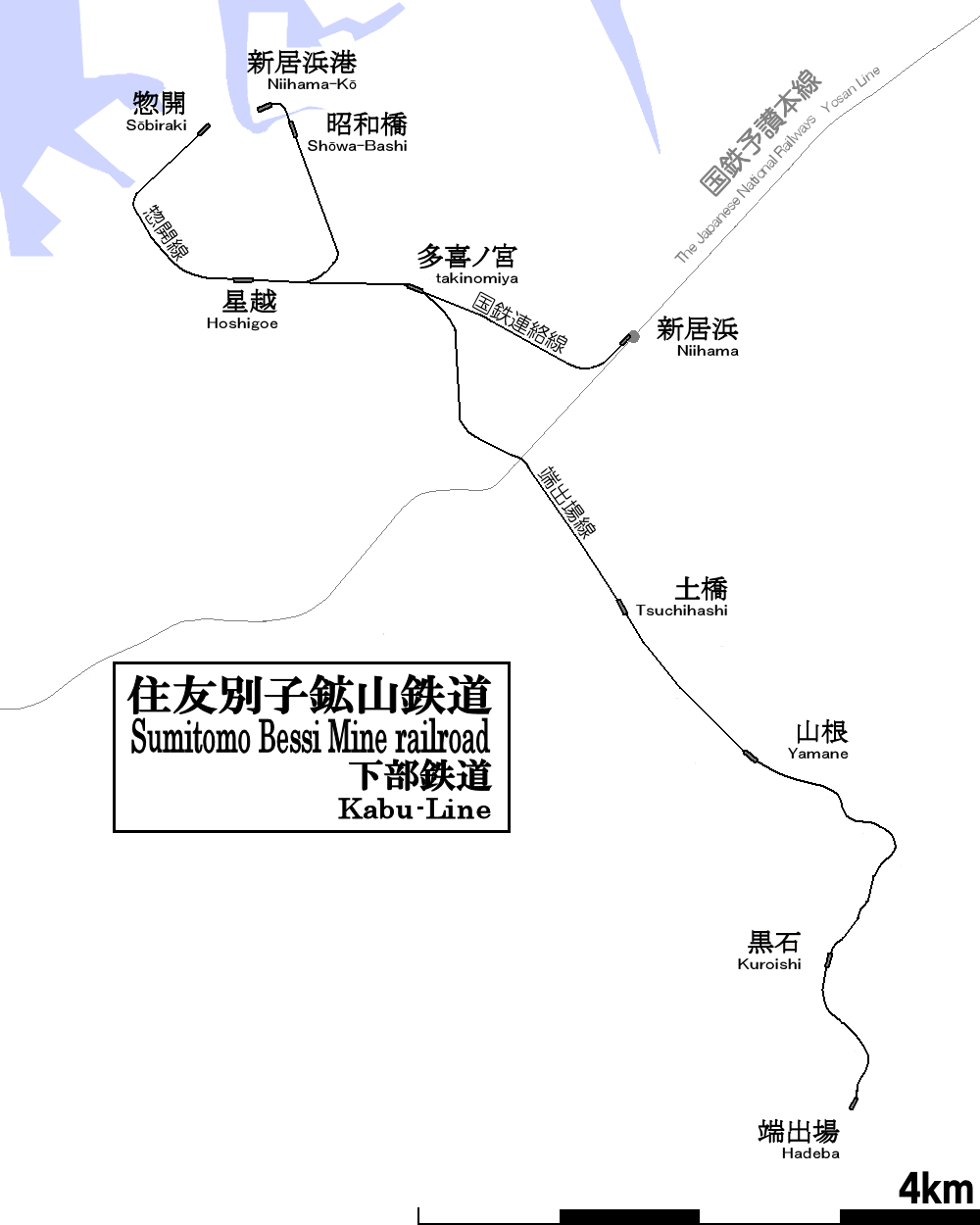 Sumitomo Bessi "Kabu-tetsudo" Mine railroad Rail Map